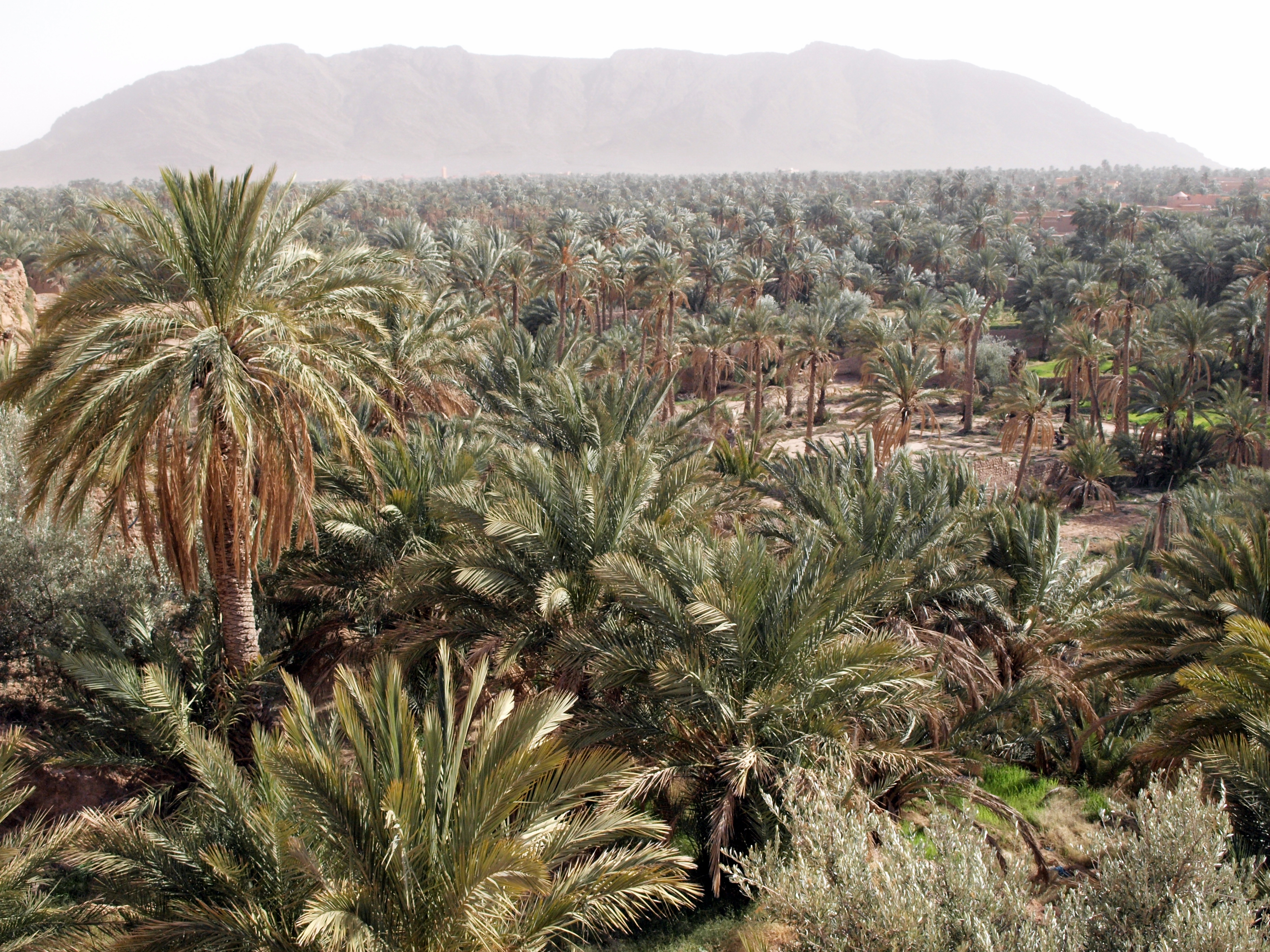 Figigo palmių oazė